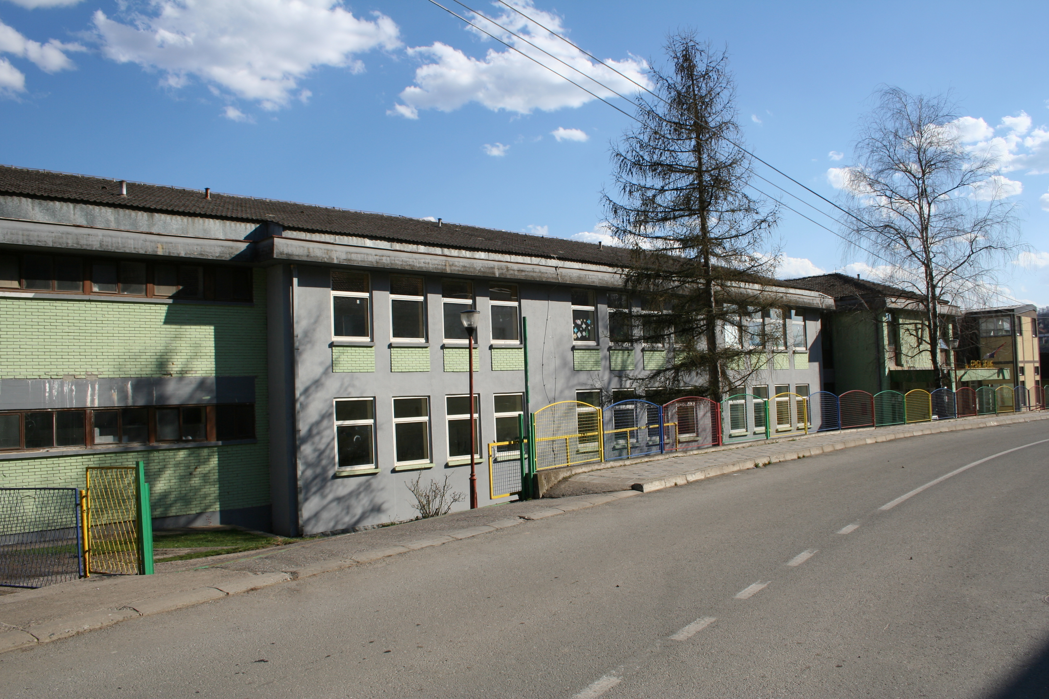 Spomenici i zgrade u Osečini